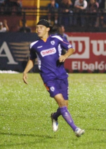 18-10-2006. Christian Bolaños jugando el clásico frente a Alajuelense en el Estadio Alejandro Morera Soto.